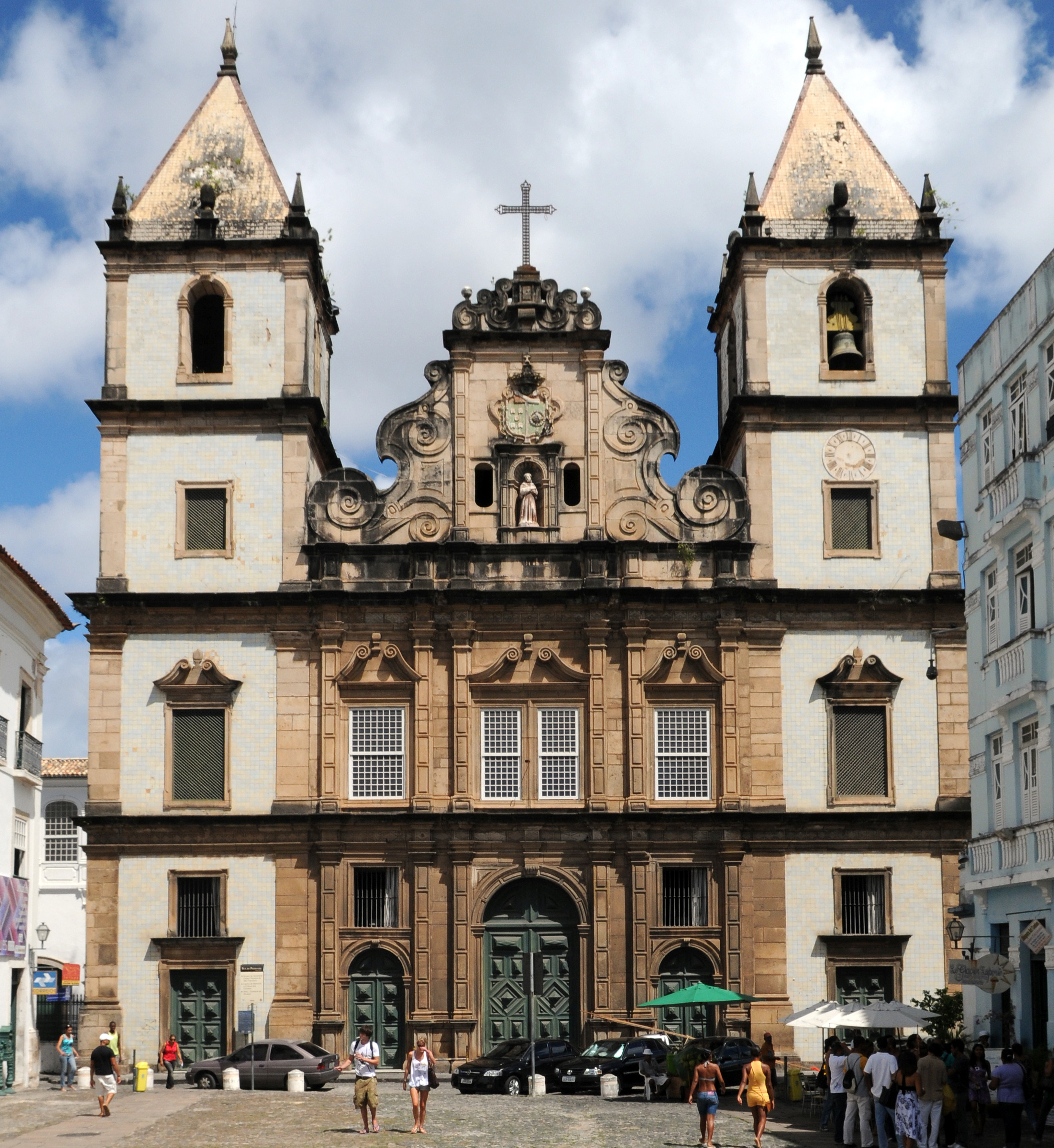 Igreja de sâo Francisco